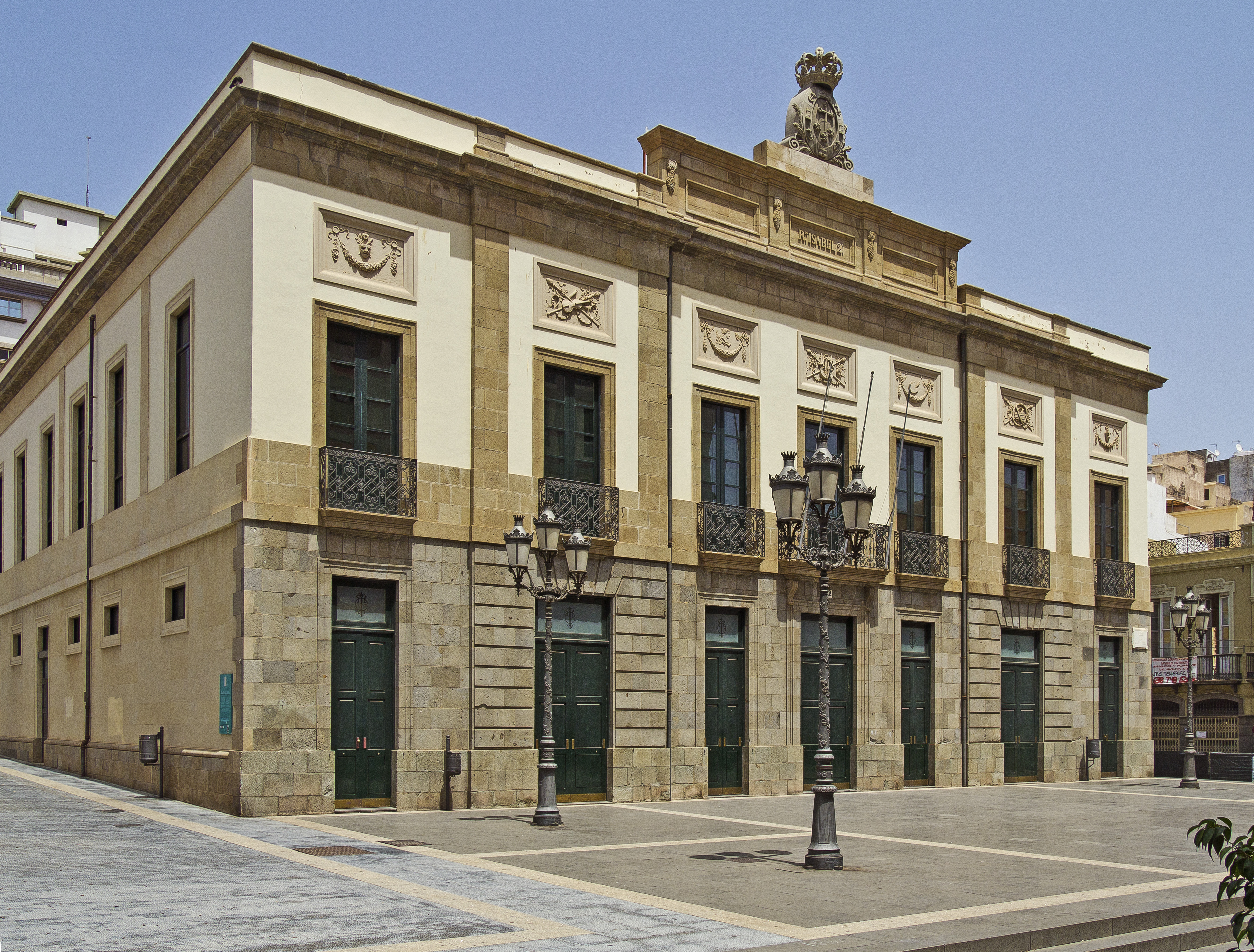 Mit dem Bau des Teatro Guimerá wurde im Jahr 1849 begonnen. Der Architekt war Manuel Oraá y Arcocha. Das Theater befindet sich auf der Plaza de la Isla de Madeira in Santa Cruz de Tenerife.